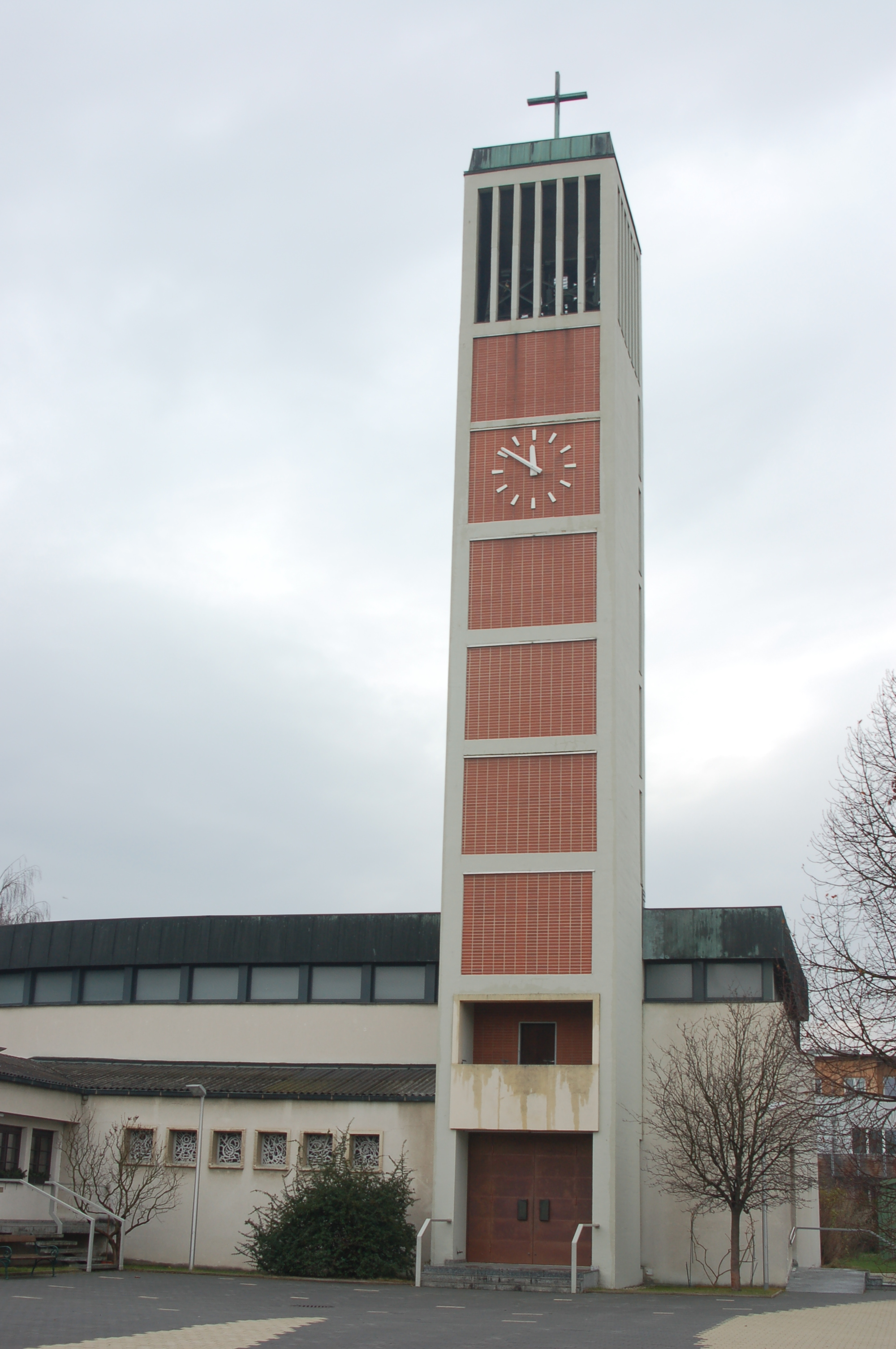 Spillern